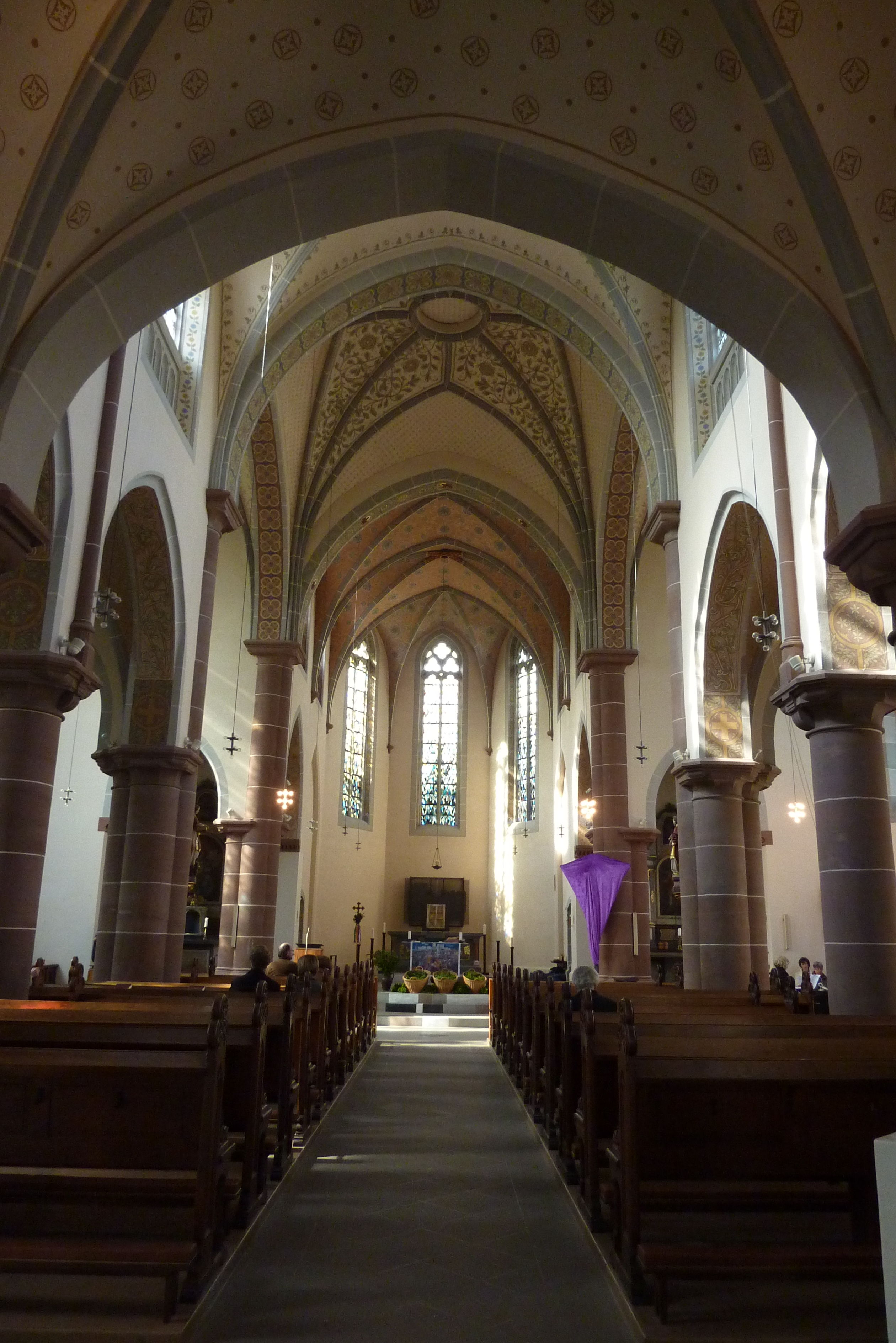 katholische Pfarrkirche St. Cyriakus in Niederau